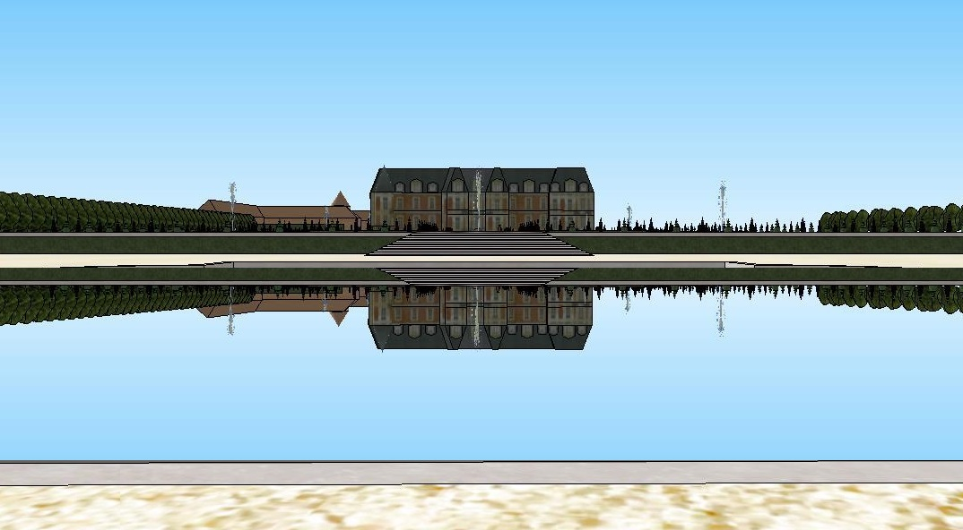 jardins du château de Monchy-Humières